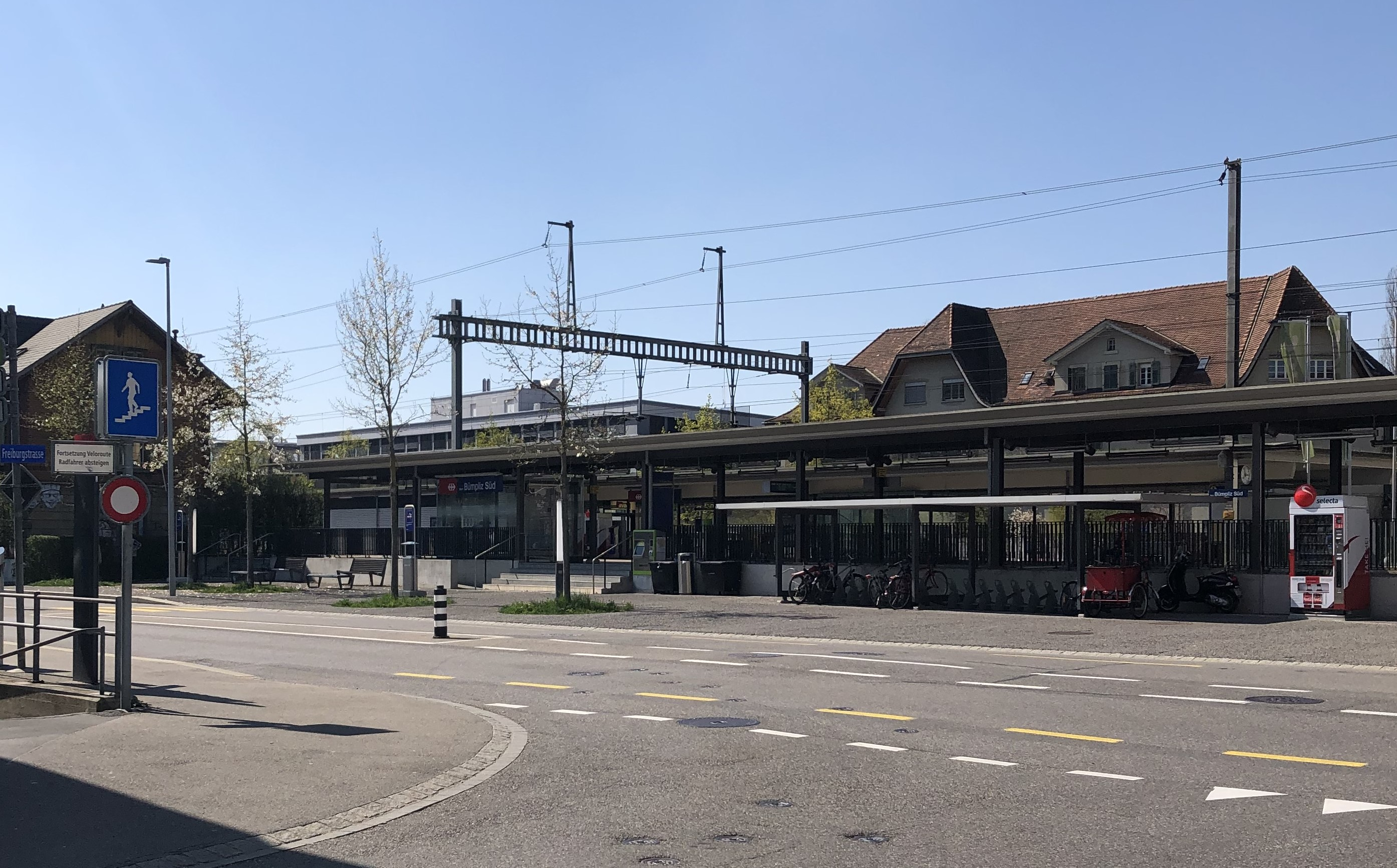 Bahnhof Bümpliz Süd von Bodenweid her gesehen